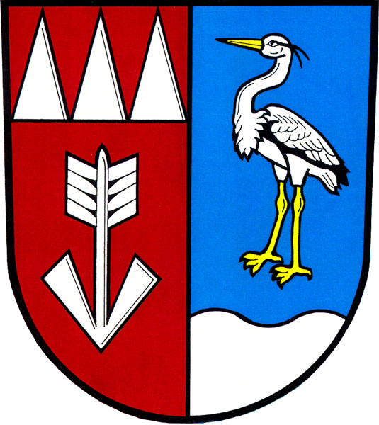 Znak obce Třemešná